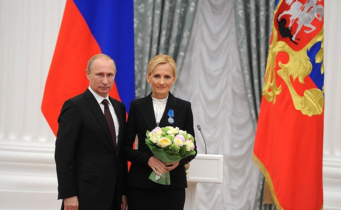 Орденом Почёта награждена Ирина Яровая